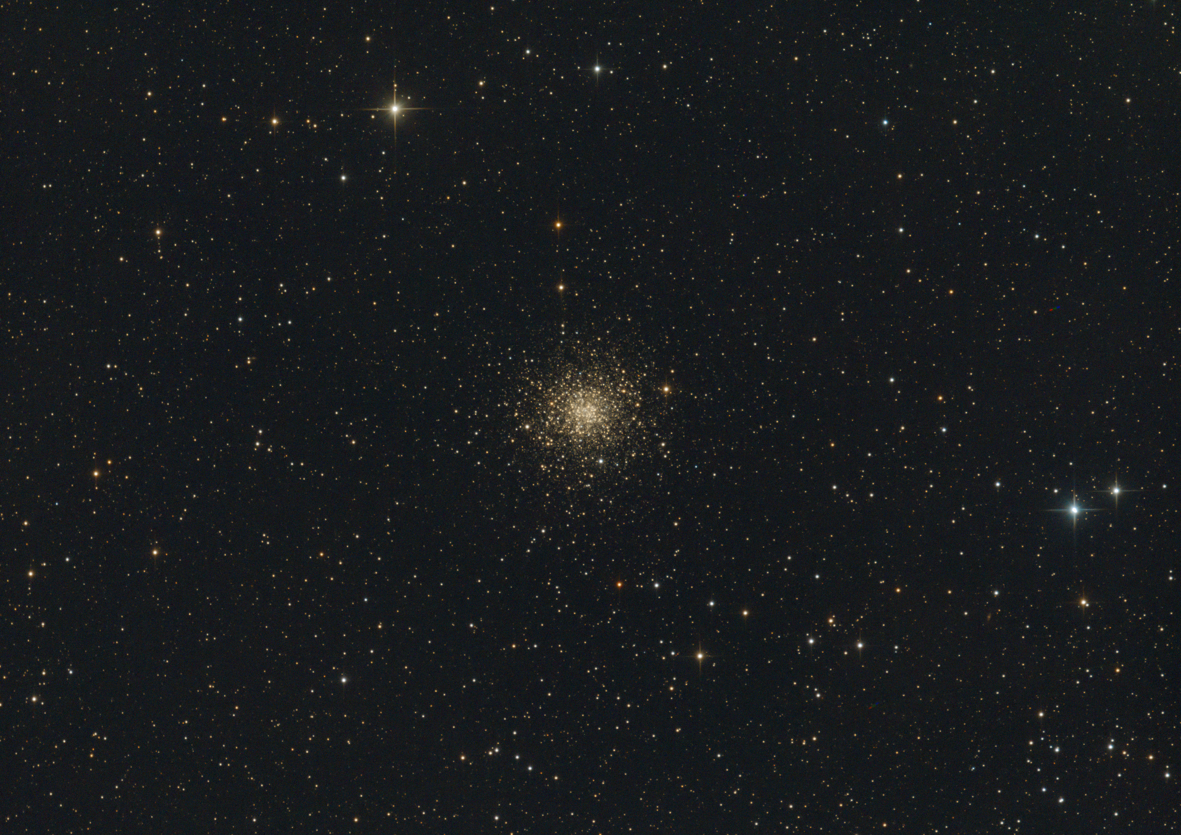 Messier 107